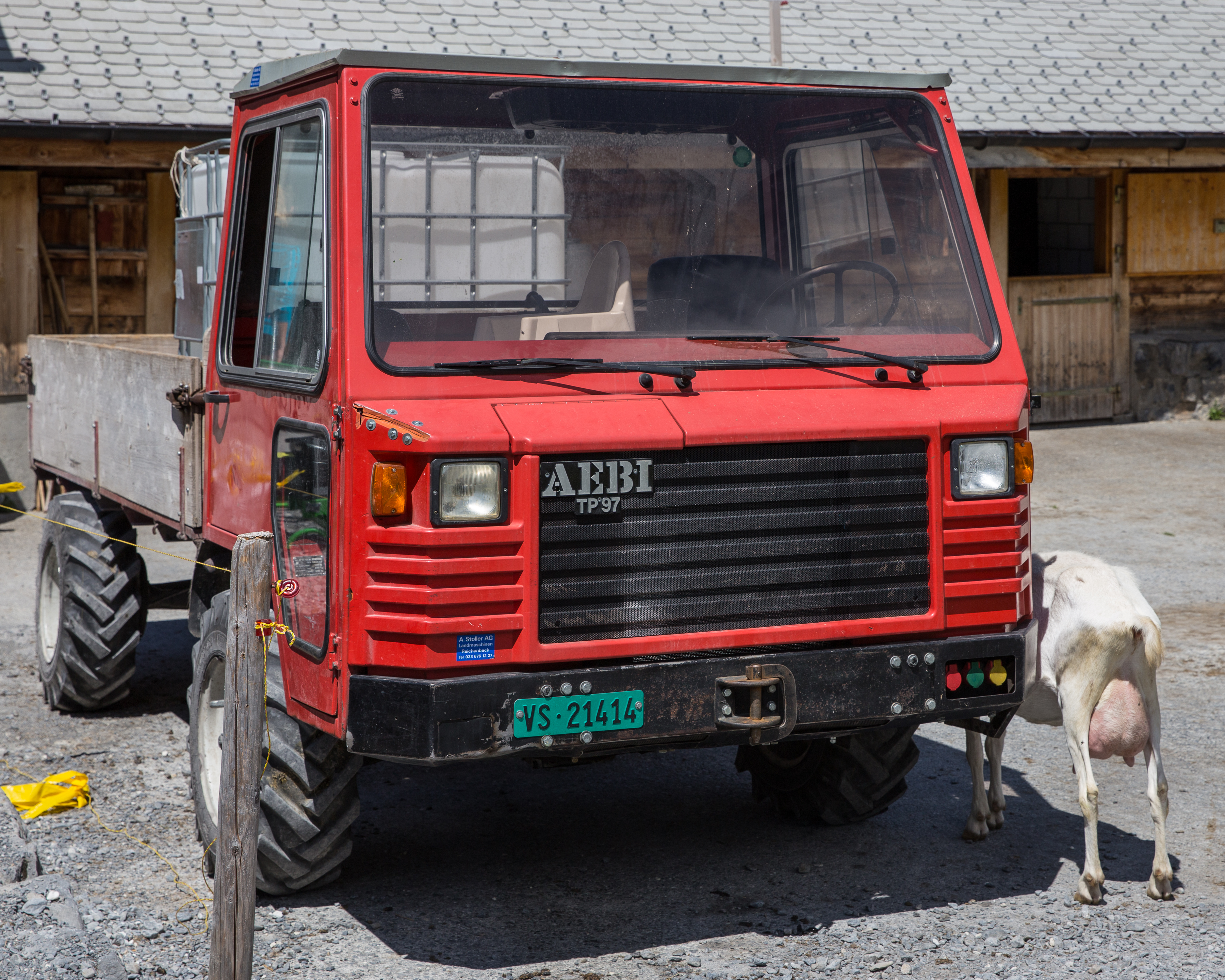 Aebi TP97 landwirtschaftlicher Transporter